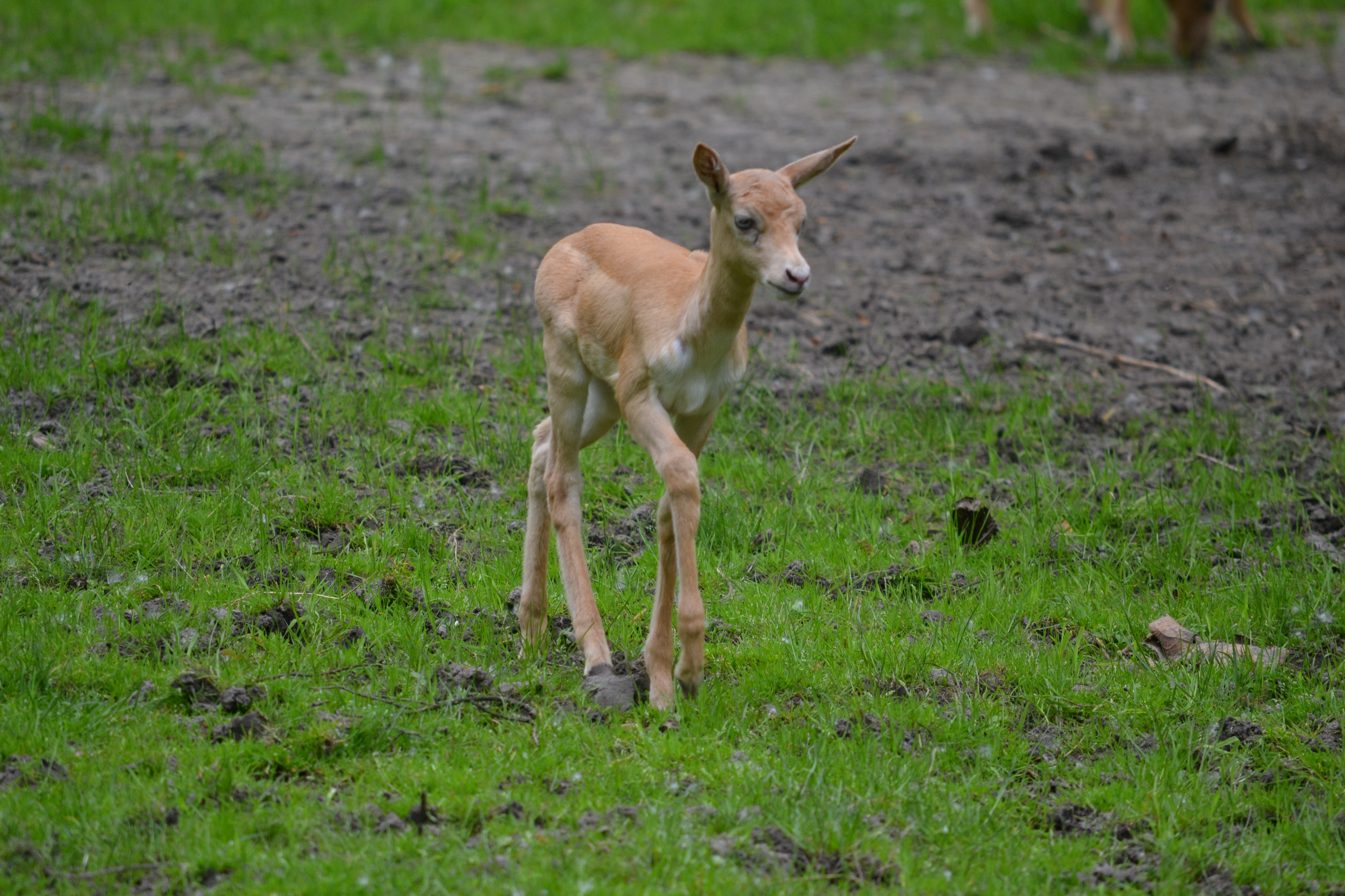 Deze foto is gemaakt in Diergaarde Blijdorp. This picture was taken at Rotterdam Zoo.